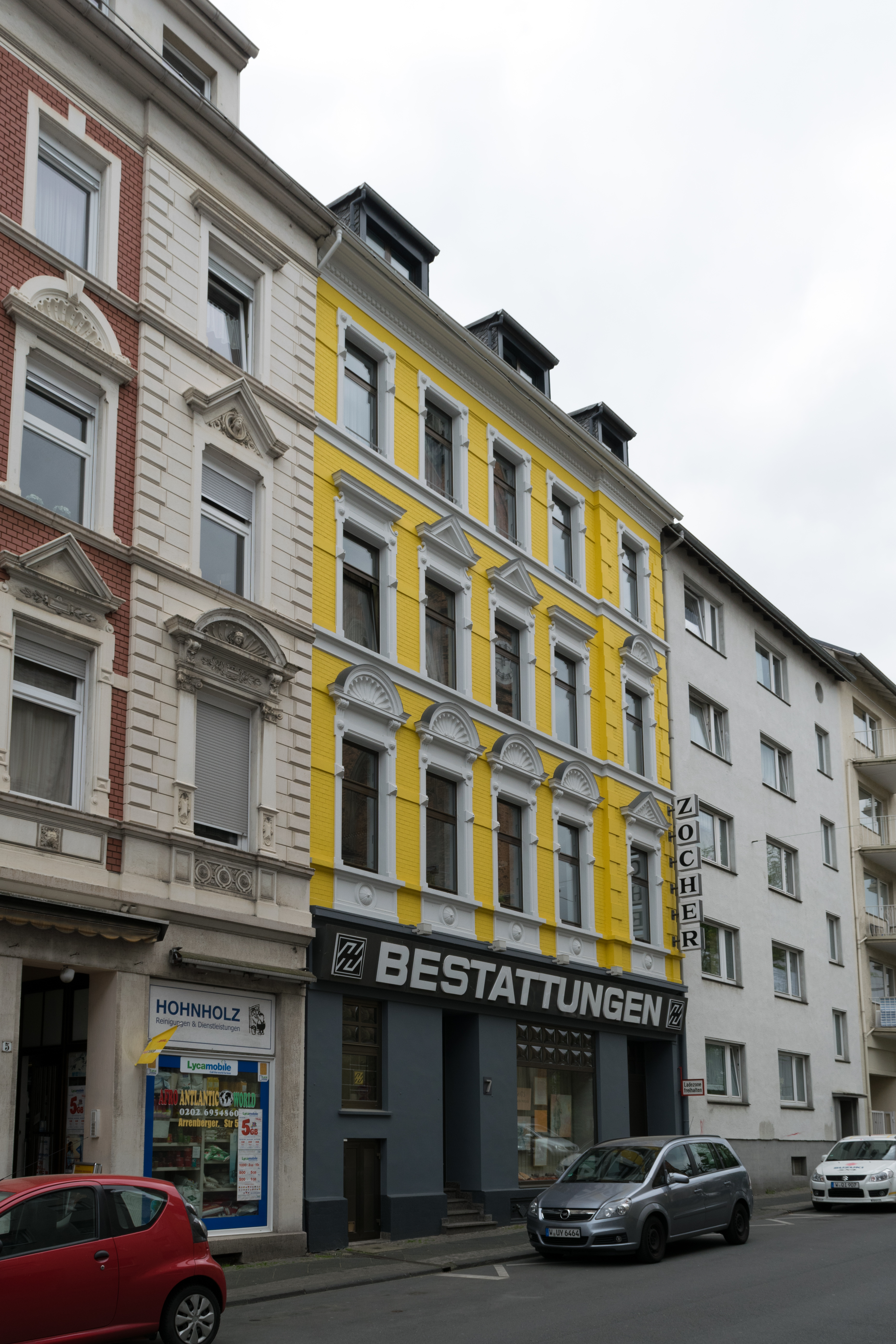 Arrenberger Straße, Wuppertal